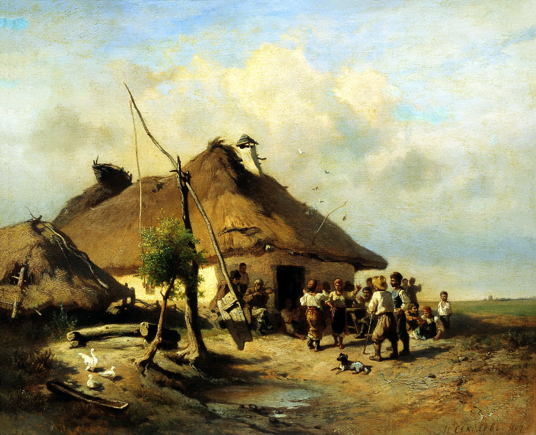 Соколов Иван - Возле шинка. 1864. Холст, масло. Закарпатский художественный музей.